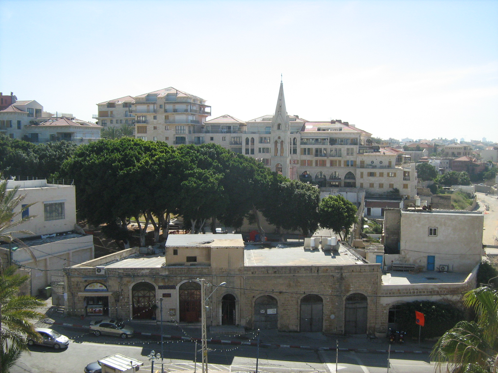 שכונת עג'מי